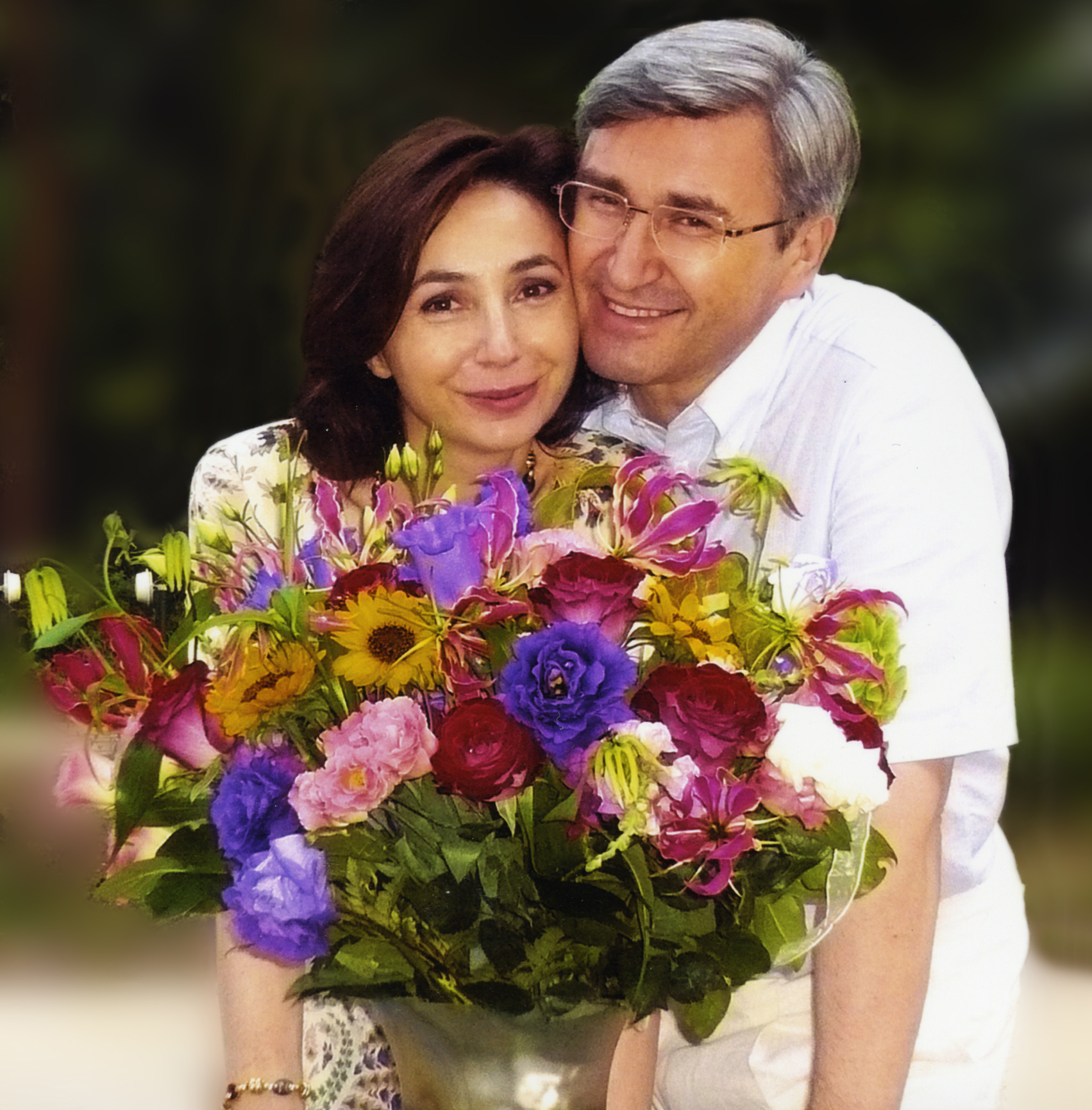 Zarząd Wydawnictwa Amber Sp. z o.o.